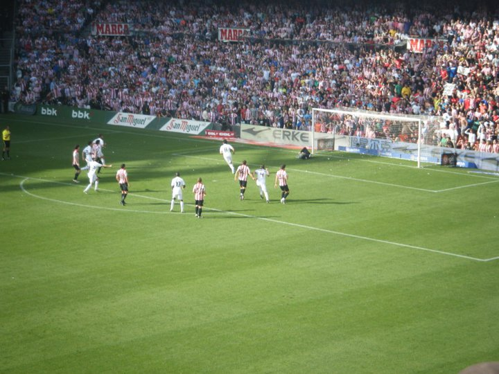 Partido disputado entre el Athletic de Bilbao y el Real Madrid